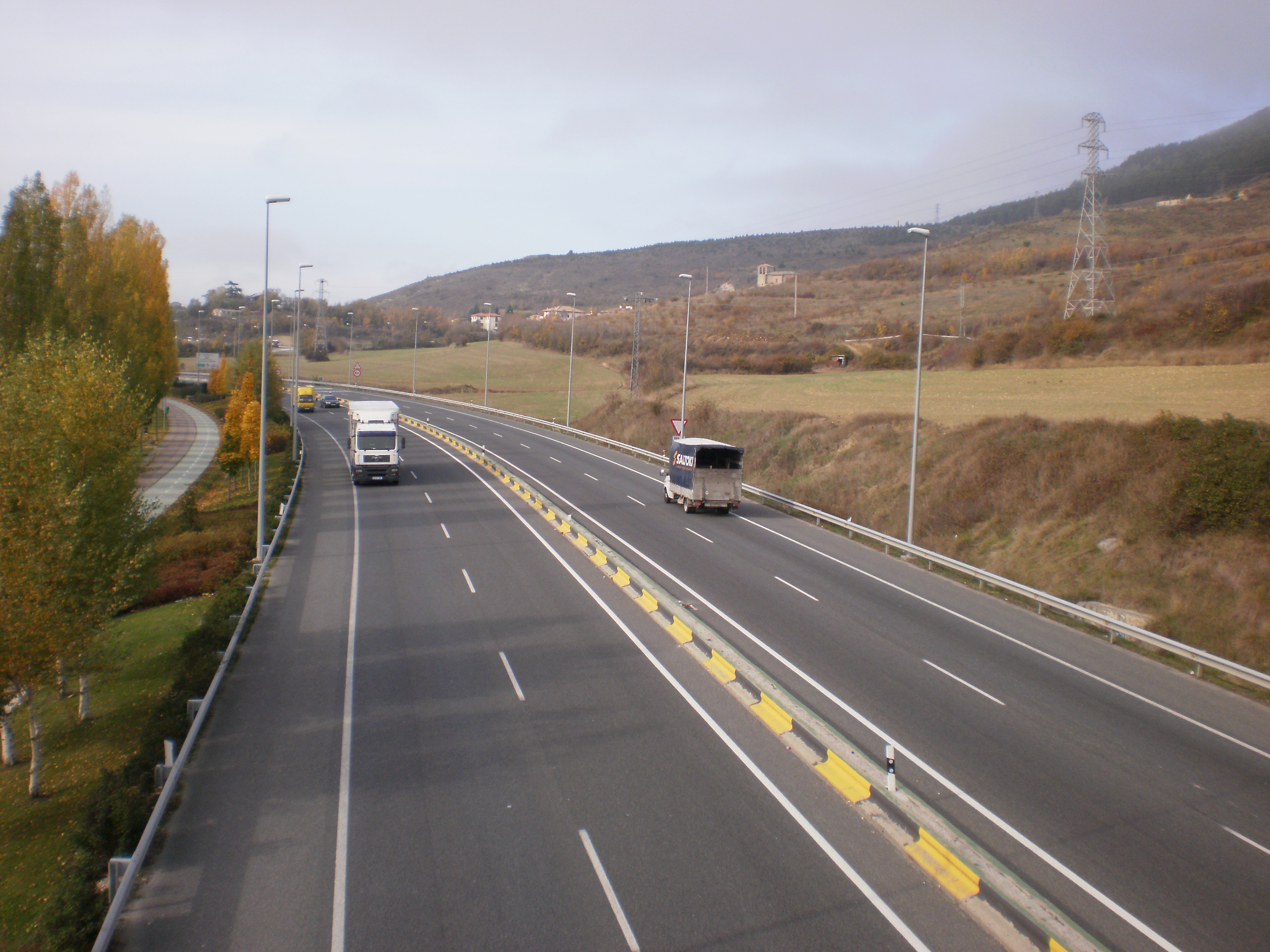 Ronda de Pamplona o Ronda Norte (PA-30) a su paso por Ansoáin